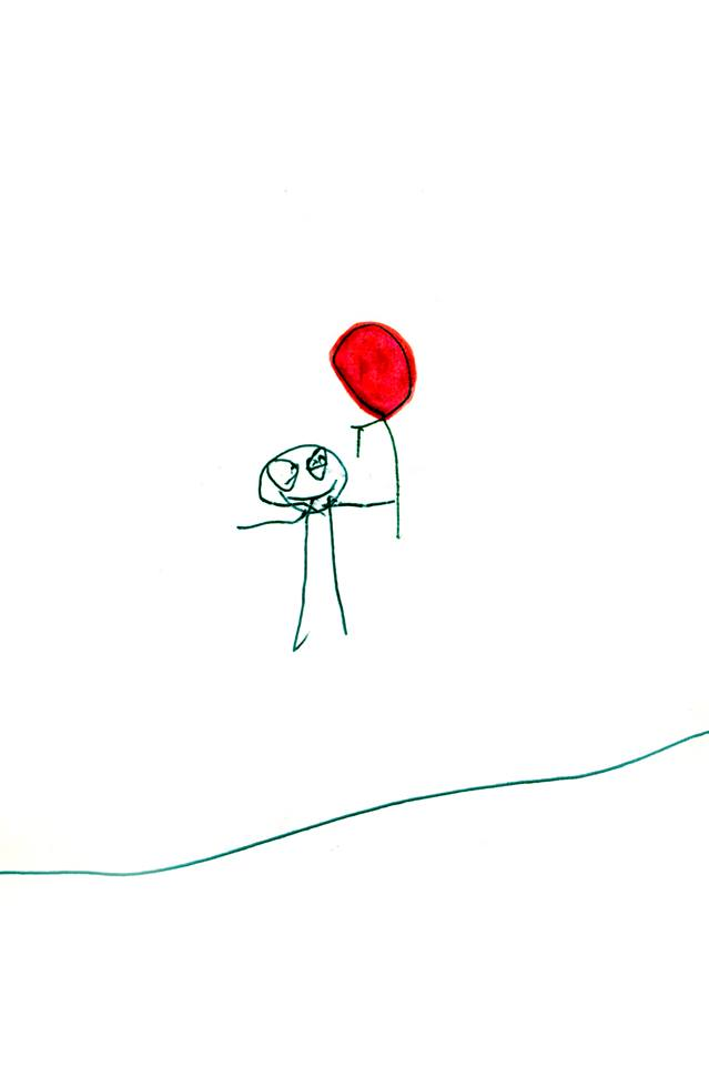 Criança, 4-5 anos desenho livre, realizado em casa, na companhia do tio um ou dois meses depois da morte da mãe e pai em acidente de transito explicado pela criança com "o menino no ar"